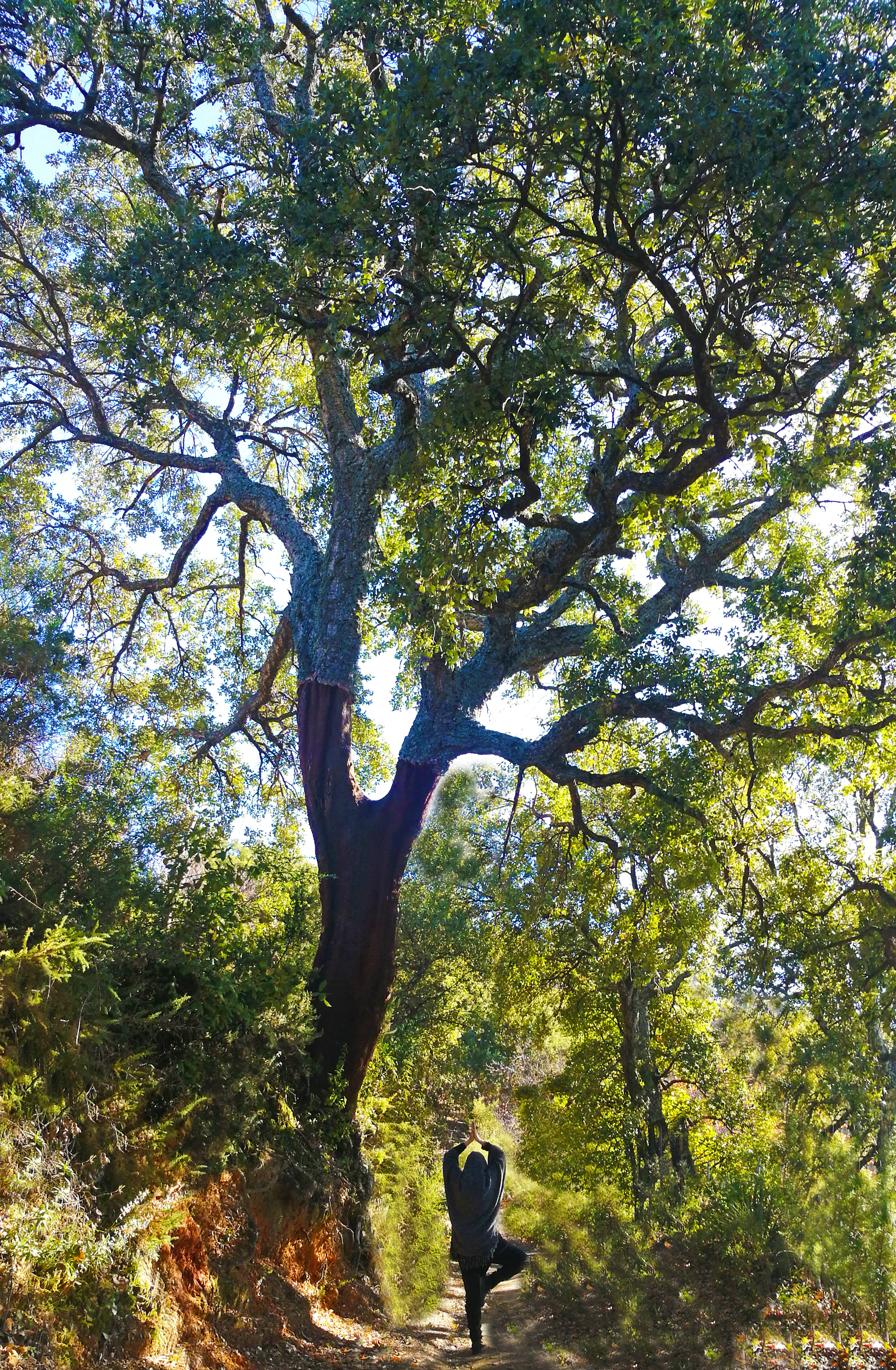 Shinrin Yoga yoga de baño pionera 2008 practicando vriksa-asana (‘postura del árbol’)